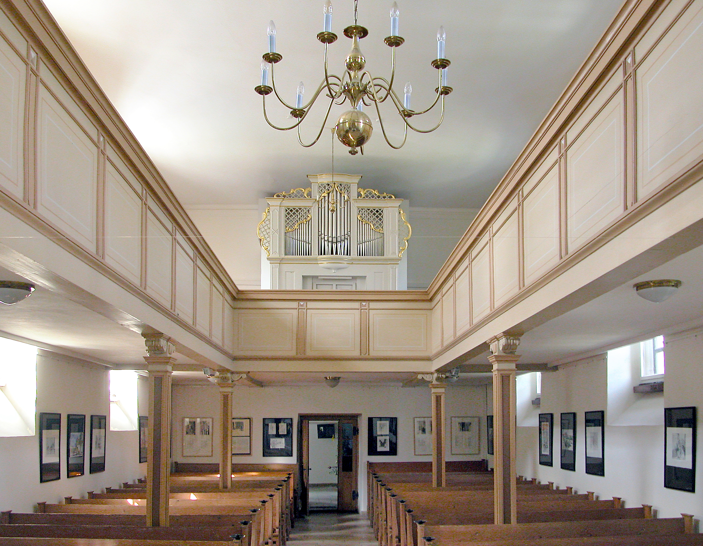 18.08.2009 04451 Panitzsch (Borsdorf), Kirchweg (GMP: 51.365350,12.535083): Dorfkirche auf älter (romanischer) Grundlage. 1705 barockisiert. Spätbarocke Orgel des Torgauer Orgelbaumeisters Johann Christian Friedrich Flemming aus dem Jahre 1786. Nach umfangreicher Restaurierung 1993 durch die Mitteldeutsche Orgelbauanstalt Voigt, Bad Liebenwerda, erklingt sie wieder in alter Schönheit. [DSCN38516.TIF]200908180085DR.JPG(c)Blobelt